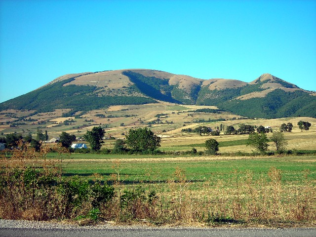 Monte Pennino, Annifo, Foligno, Perugia, Umbria, Italy